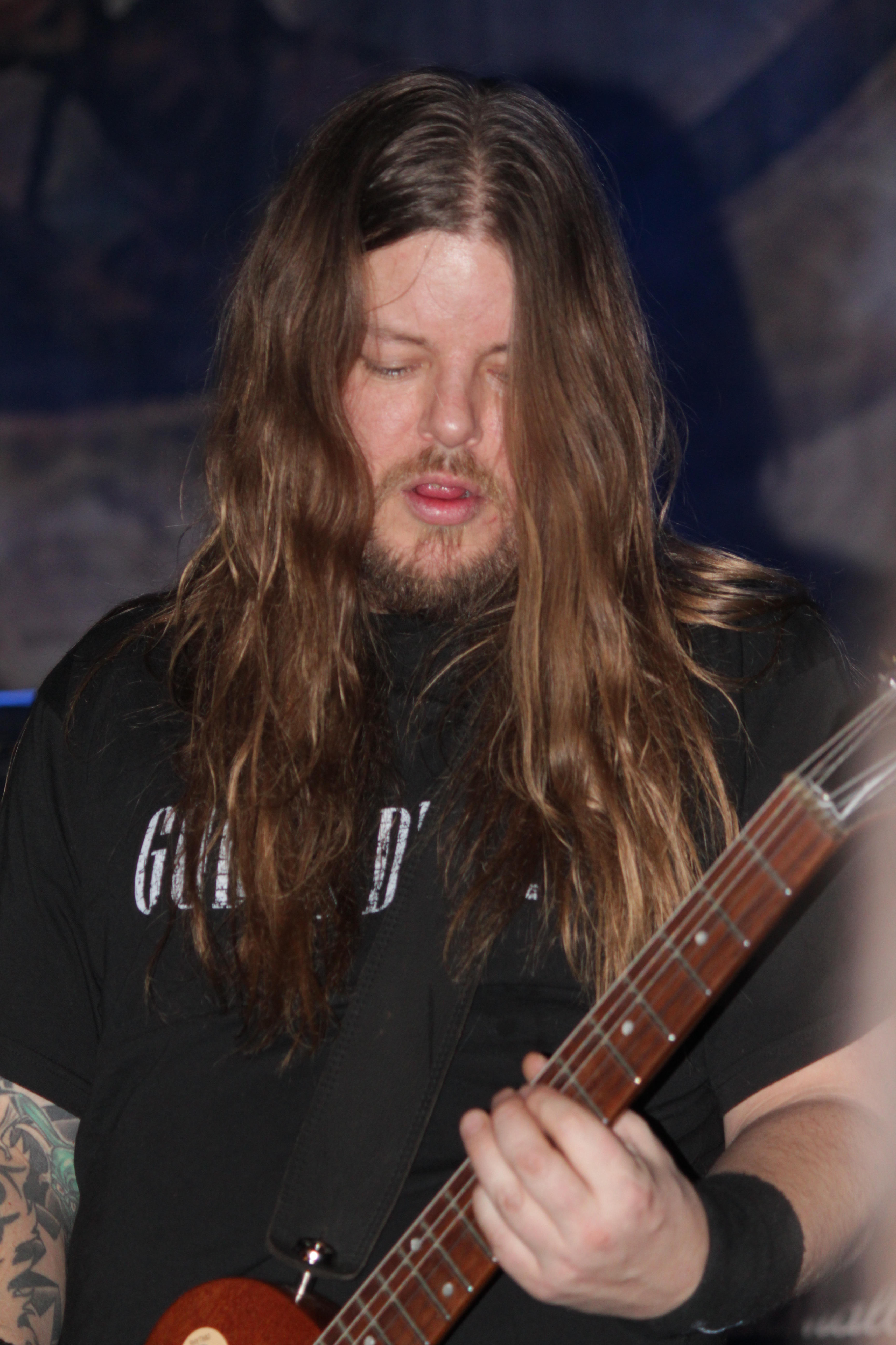 Nico Elgstrand i Entombed, på Cozmoz, Borlänge, Sverige.